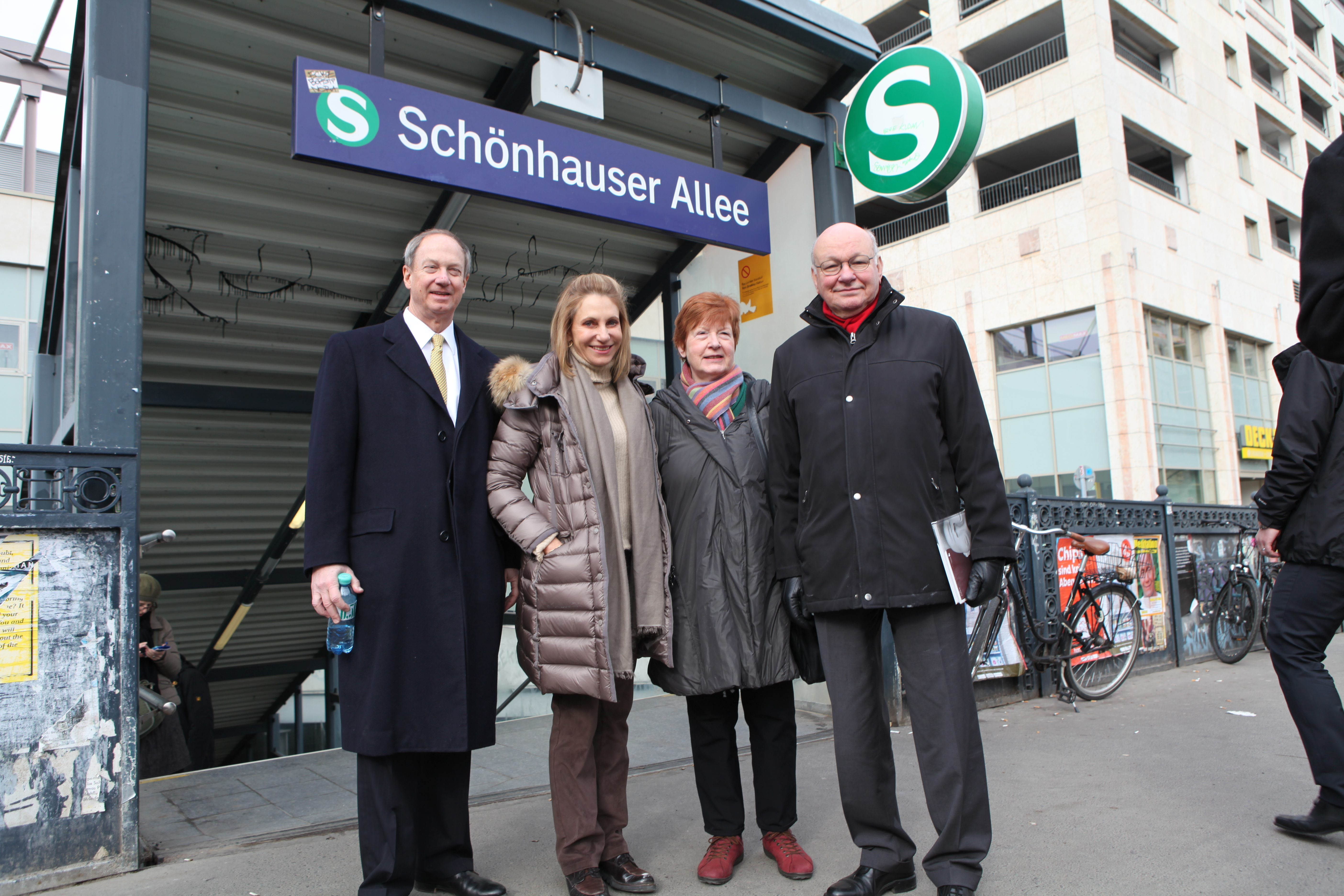 Walter and Anne Momper with Ambassador and Mrs. Emerson at Schönhauser Allee S-Bahnhof